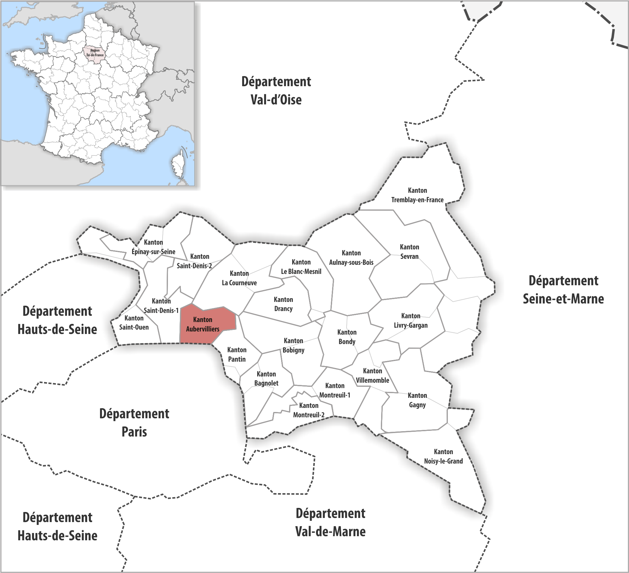 Lage des Kantons Aubervilliers